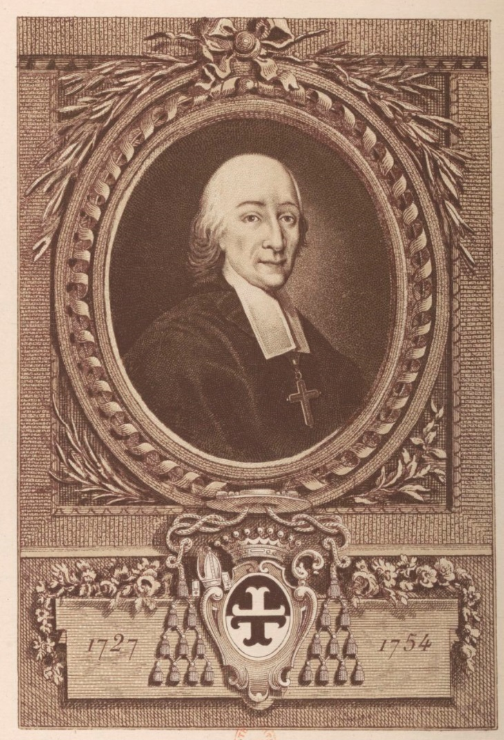 Portrait de Jean-Baptiste de Surian, oratorien et évêque de Vence.